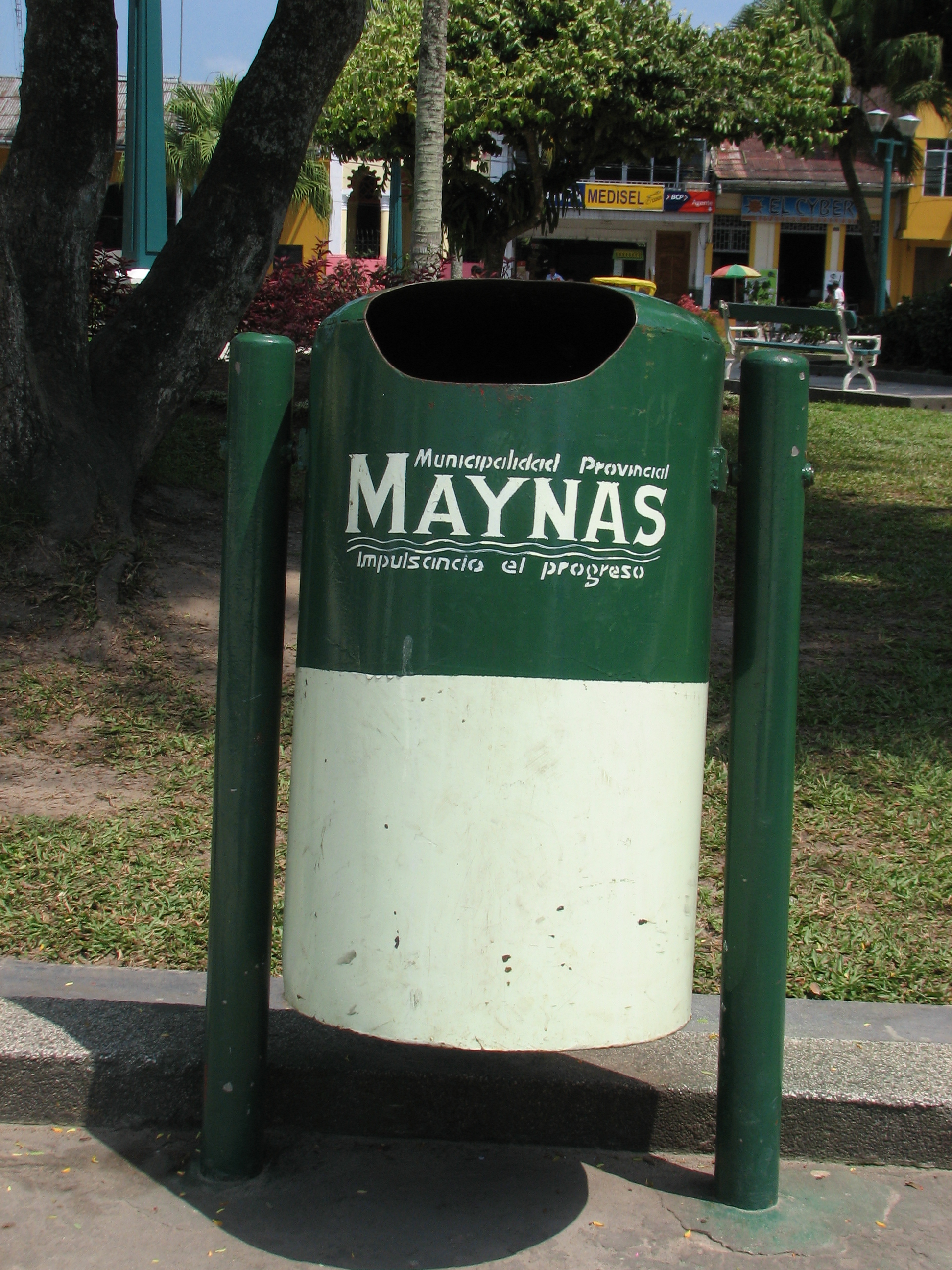 Trash bin on Plaza de Armas in Iquitos/Maynas/Loreto, Peru